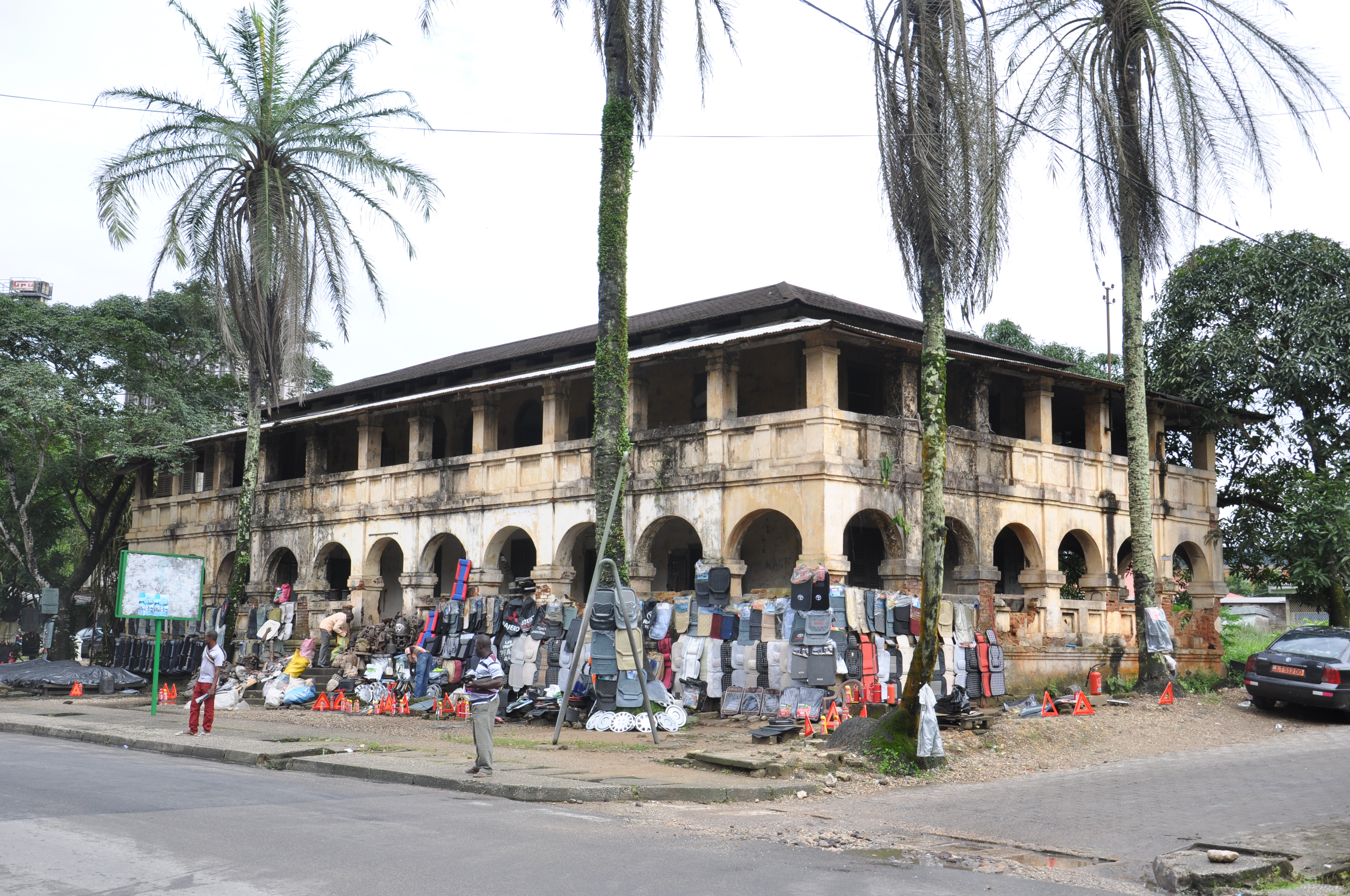 Villa Mandessi Bell